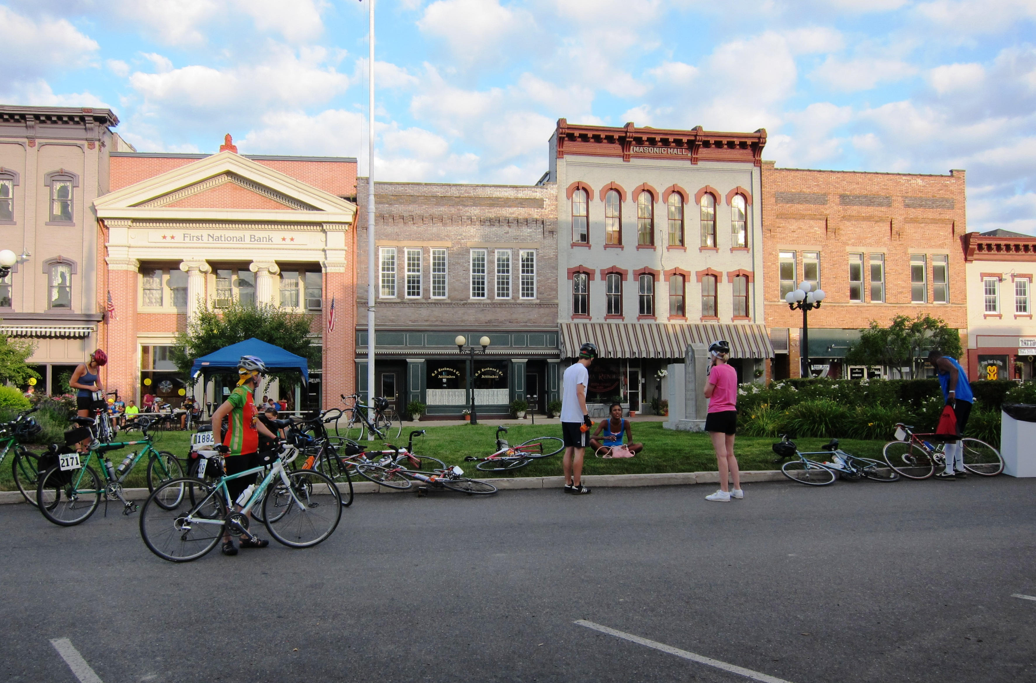 Nelsonville Ohio